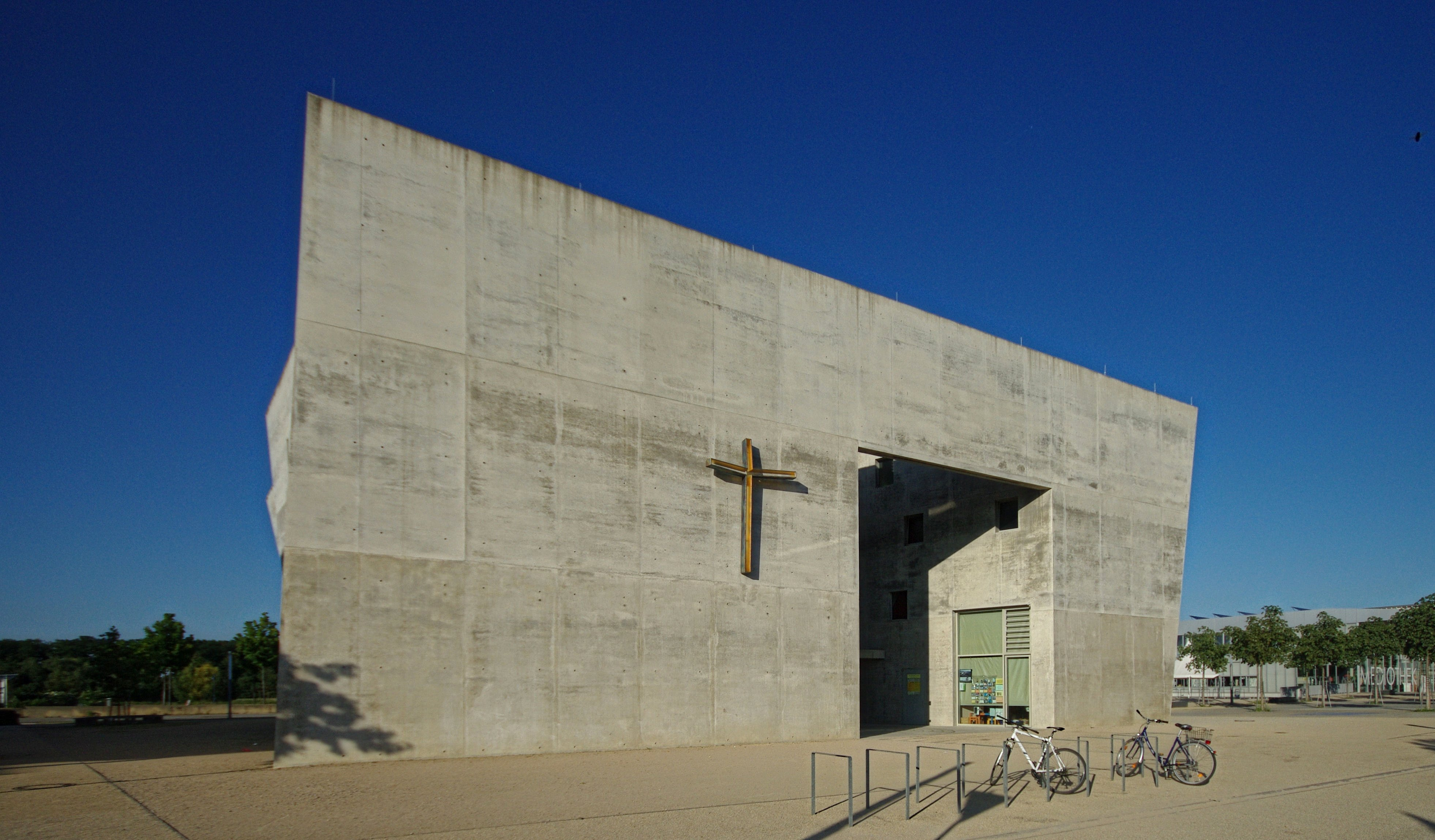 Maria Magdalena, katholische und evangelische Kirche